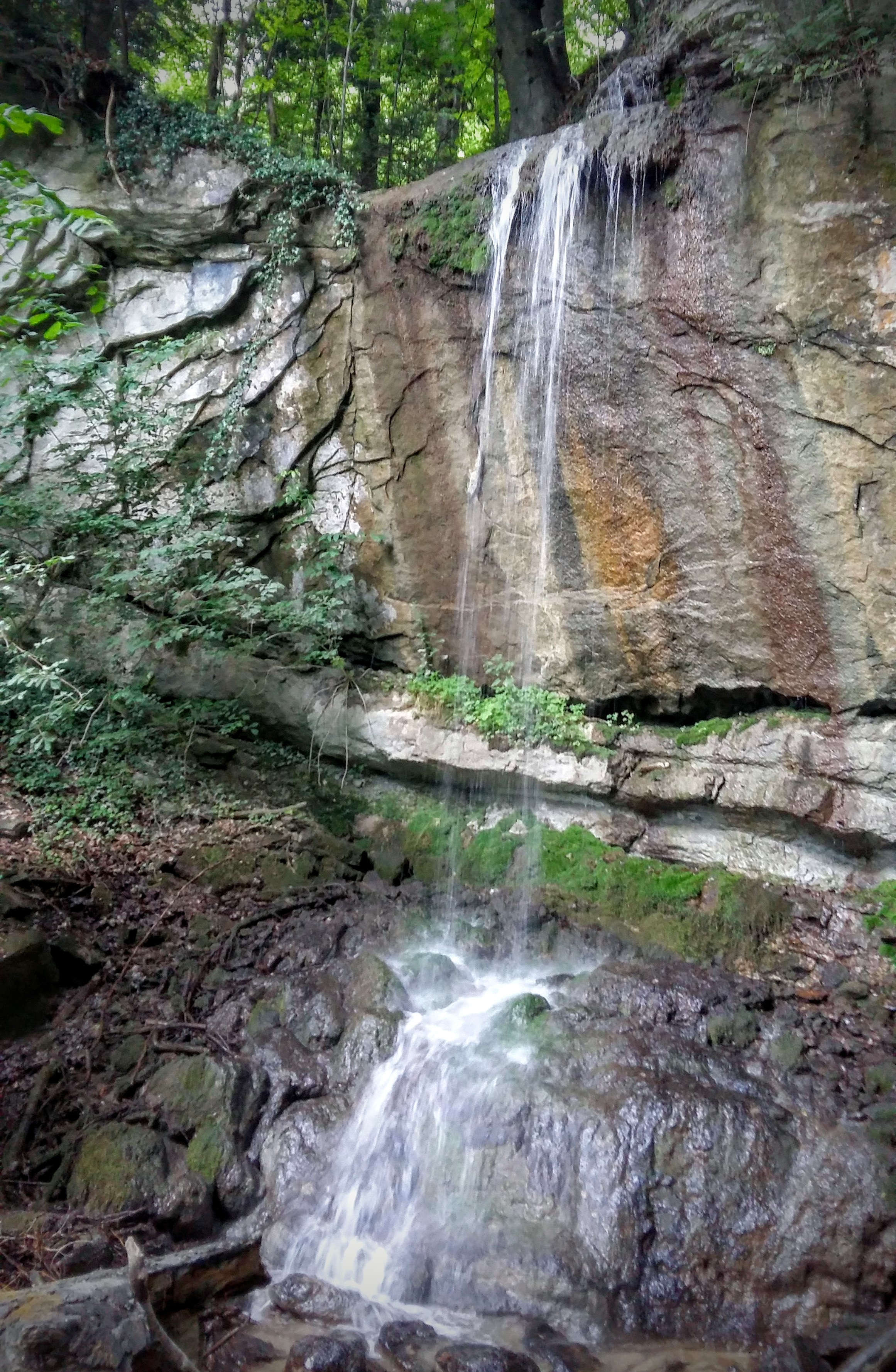 Der Schlifitobel-Wasserfall zwischen Berneck und Büriswilen